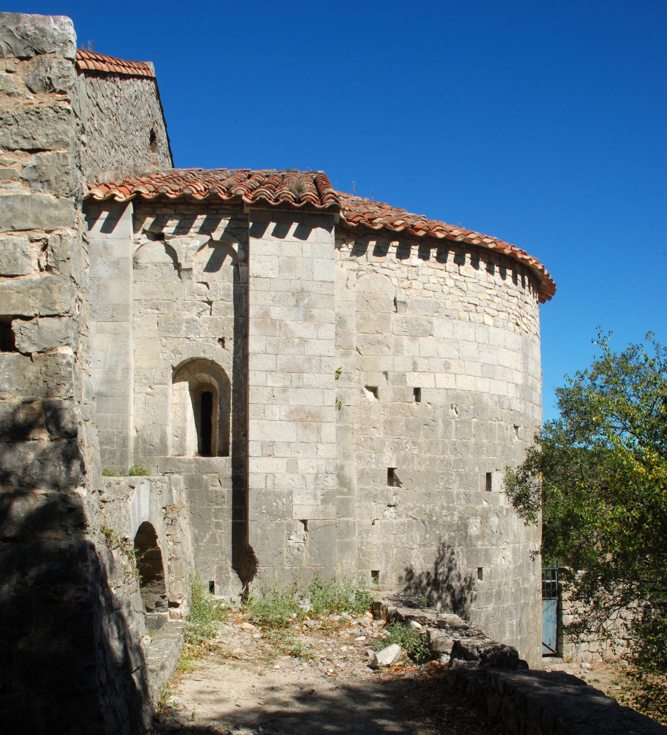 France - Hérault - Brissace - Chapelle Saint-Étienne d'Issensac